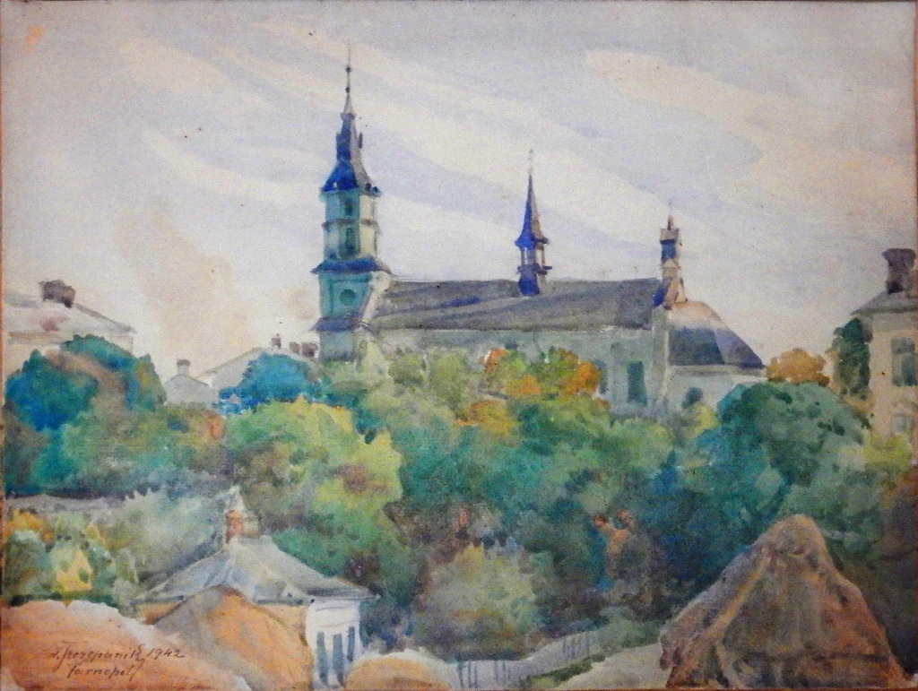 Reprodukcja akwareli Władysława Szczepanika - Kościół Jezuitów w Tarnopolu (1942)